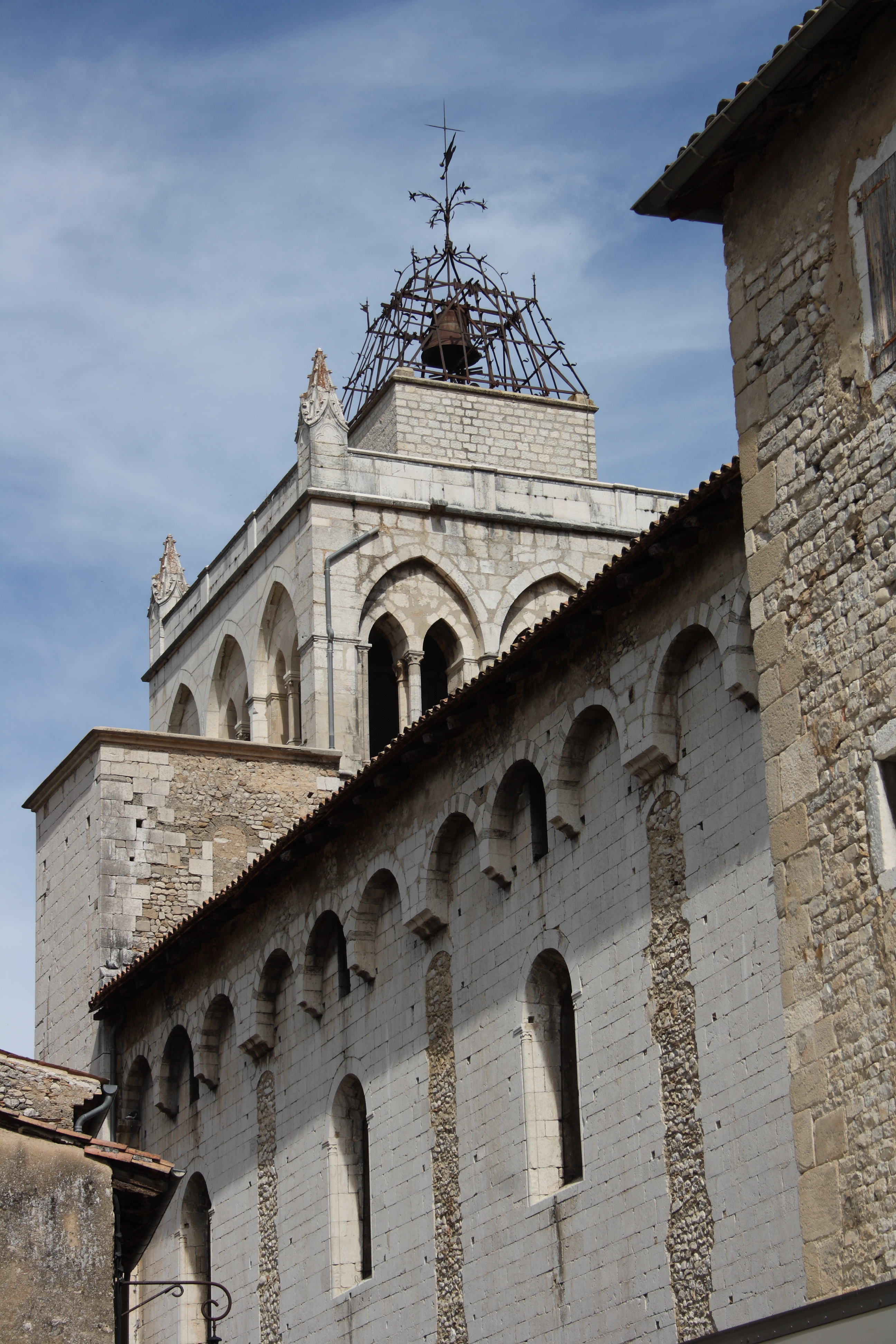 Kathedrale Notre-Dame in Die